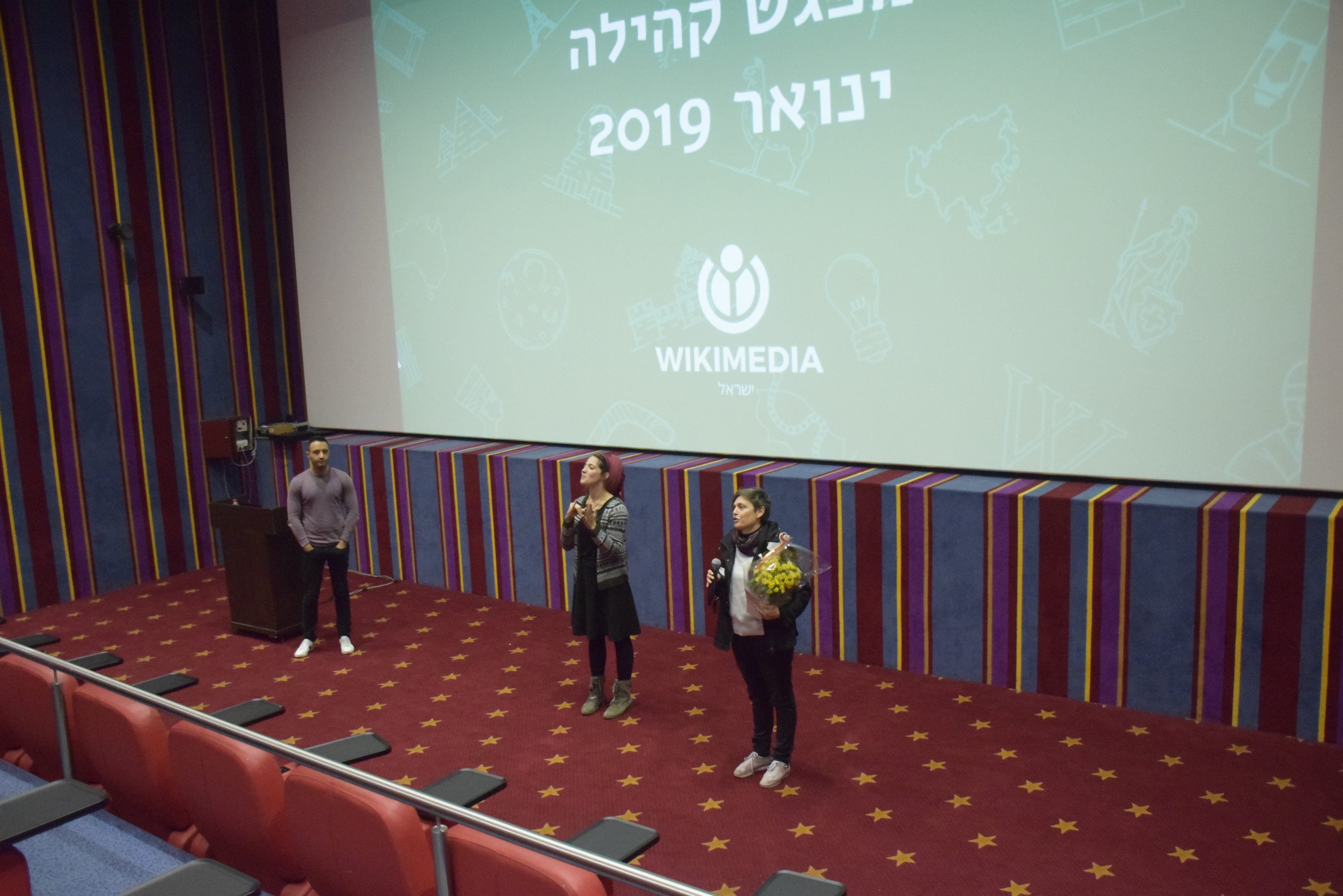 מפגש ויקיפדיה חורף 2019, סינמה סיטי ירושלים